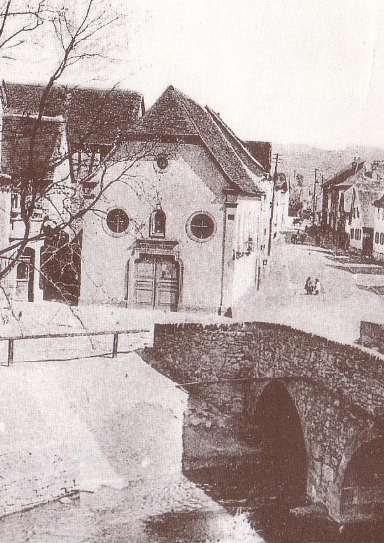 Michaelskapelle Damm (Aschaffenburg) um die Jahrhundertwende